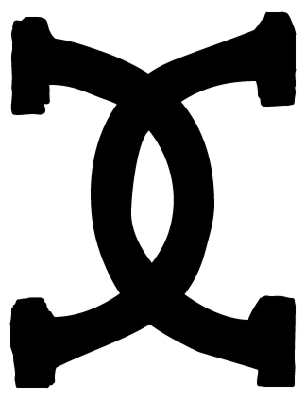 Bomärke